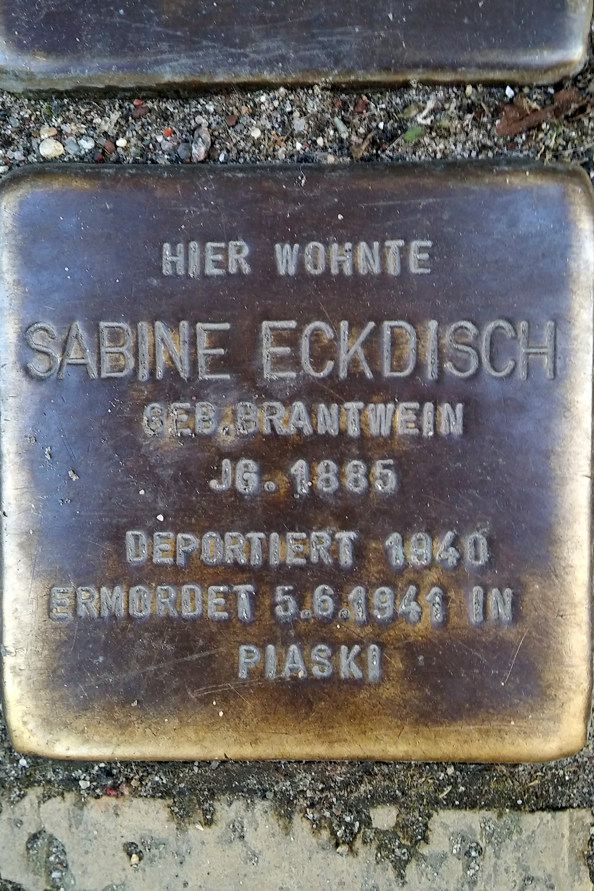 Stralsund, Frankenstraße 11, Stolperstein Sabine Eckdisch